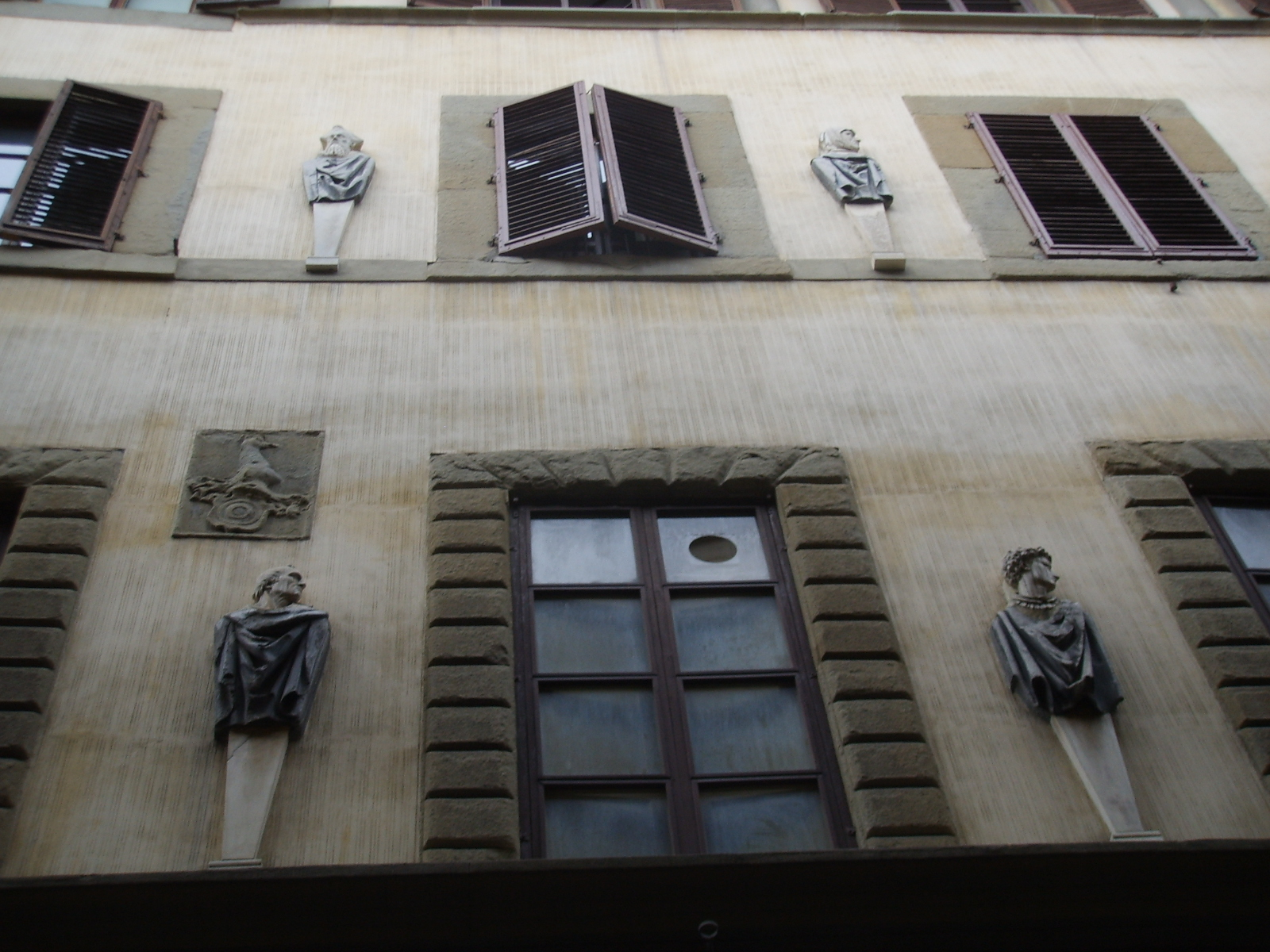 Palazzo dei visacci 07